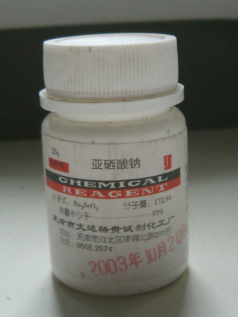 Sodium selenite